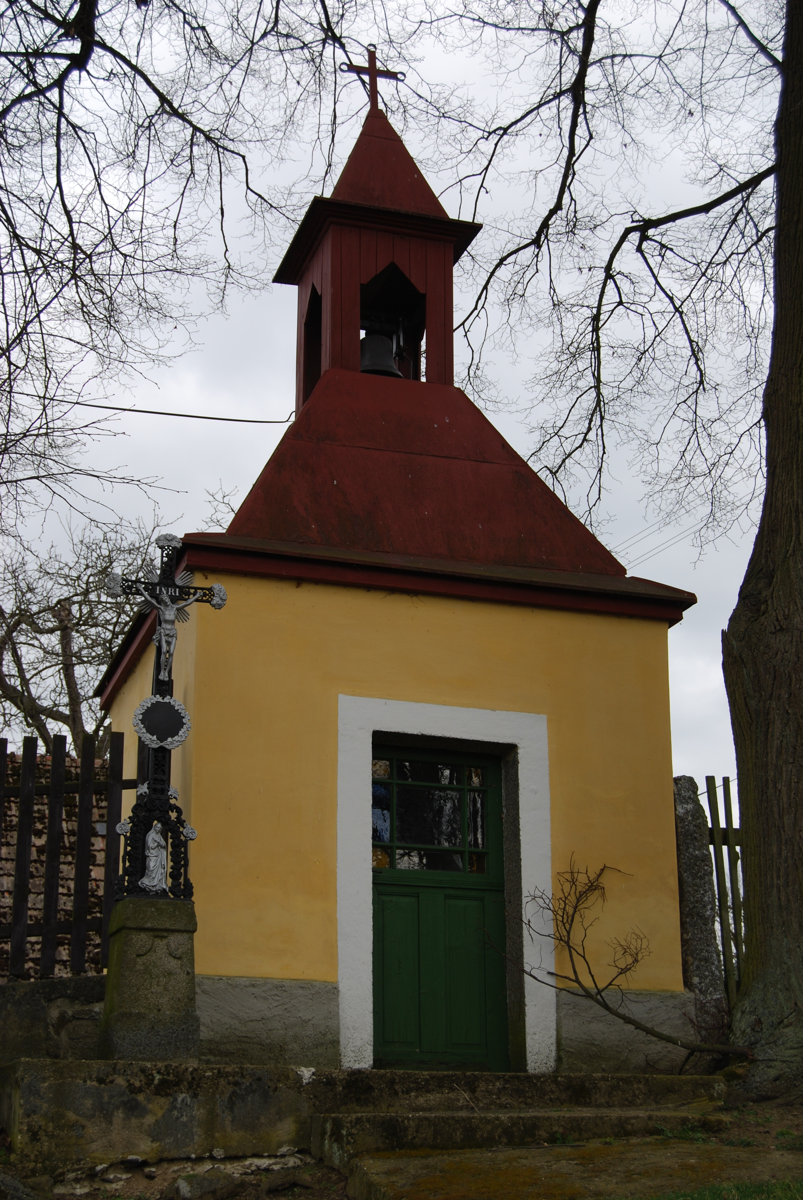 Návesní kaple a kříž vedle. Mokřice je malá vesnice, část obce Krásná Hora nad Vltavou v okrese Příbram. Česká republika.